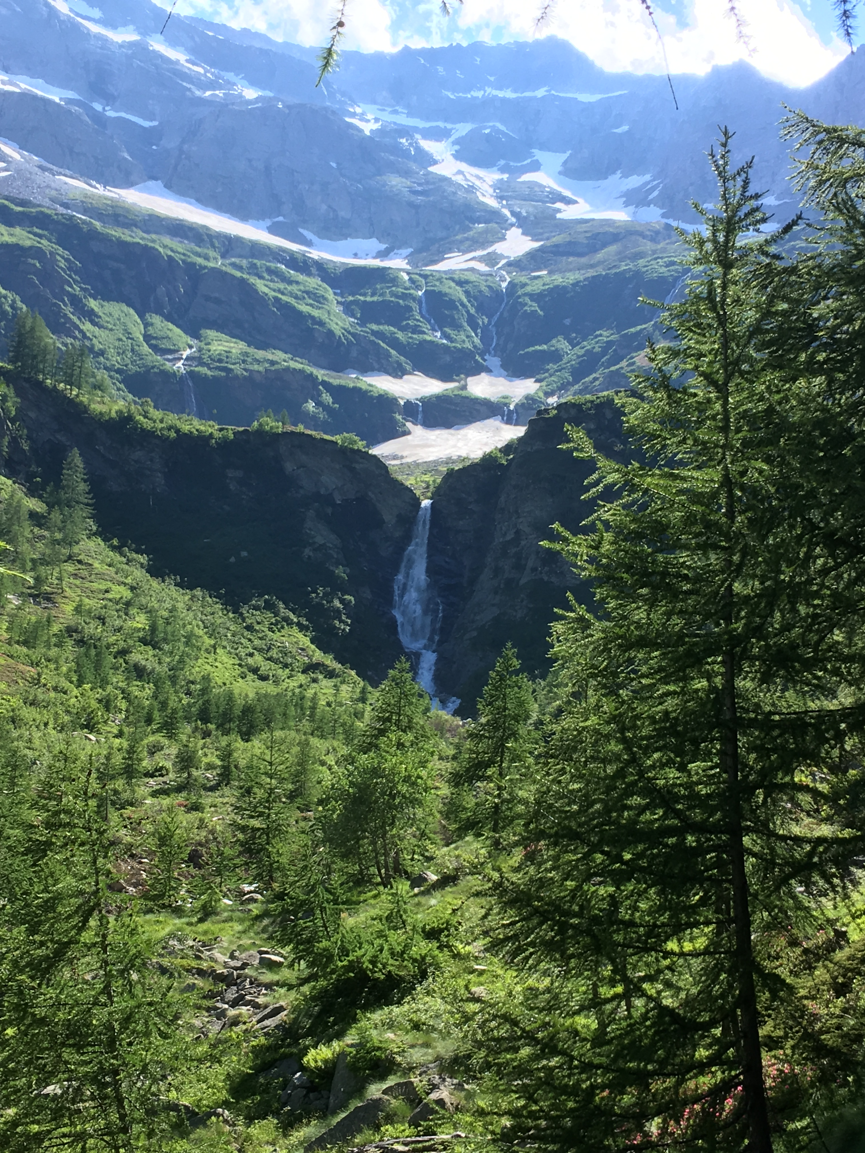 Parco naturale dell'Alta Valle Antrona (Q3895641)